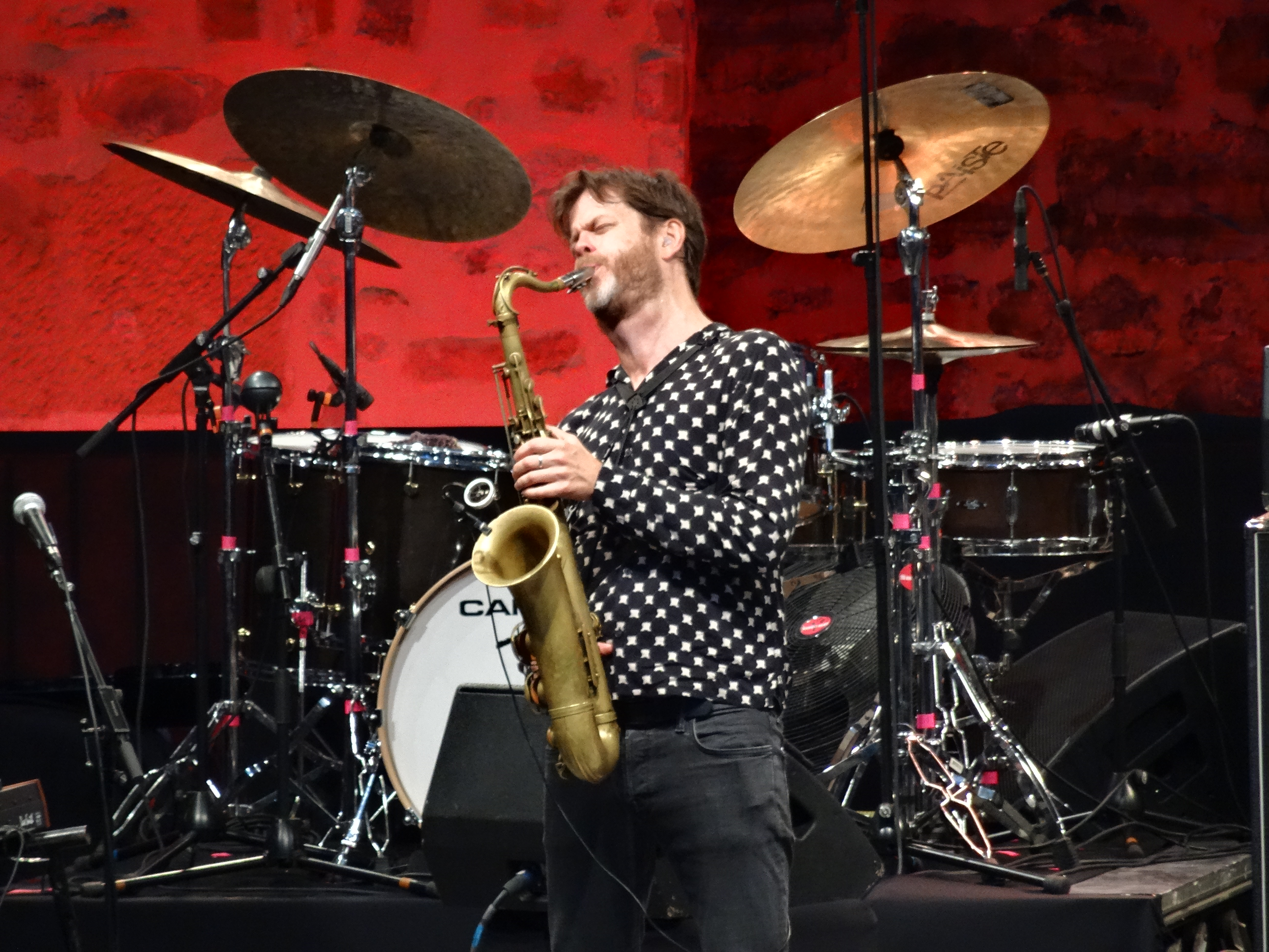 Concierto de Donny McCaslin Quartet en Donostia Jazzaldia (Escenario Plaza Trinidad, 23 de julio de 2017) Festival de Jazz de San Sebastián